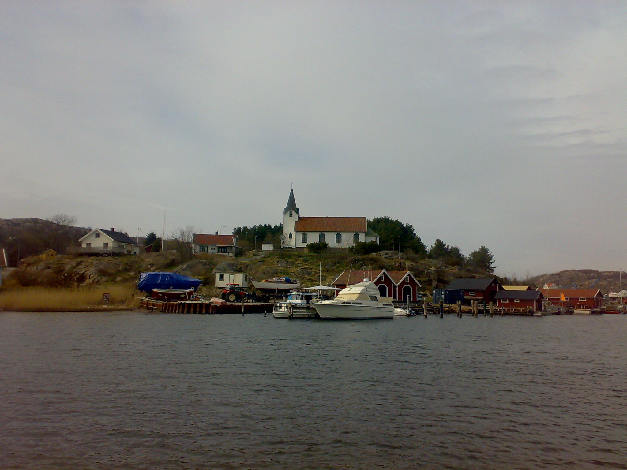 Hamburgö Tanum Sverige Sweden